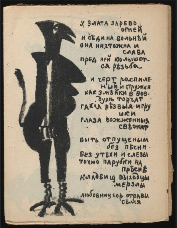 Казимир Малевич. Ілюстрація до книги О.Кручоних і В.Хлєбнікова «Гра в пеклі», 1914. Папір, літографія